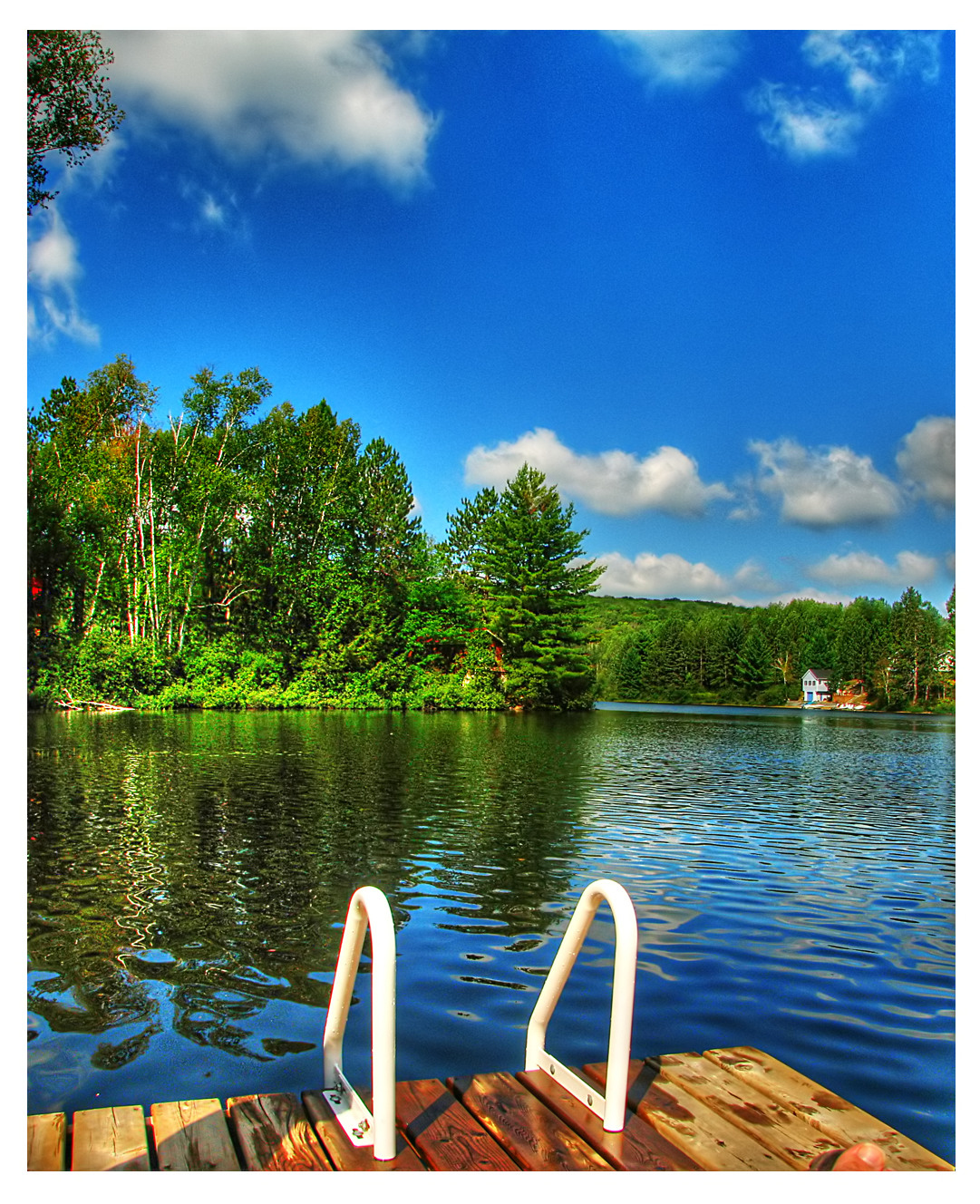 Lake St. Peter